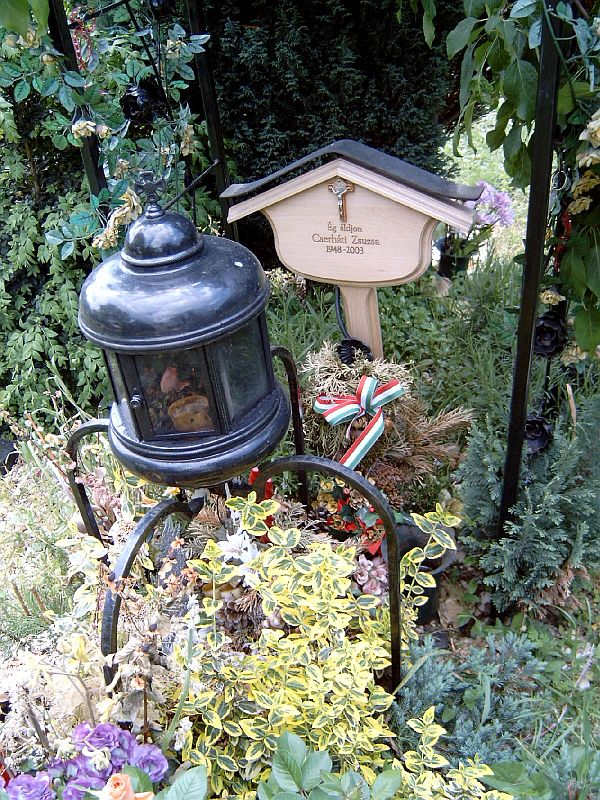 Cserháti Zsuzsa sírja Budapesten. Farkasréti temető: 60/4-3-6.